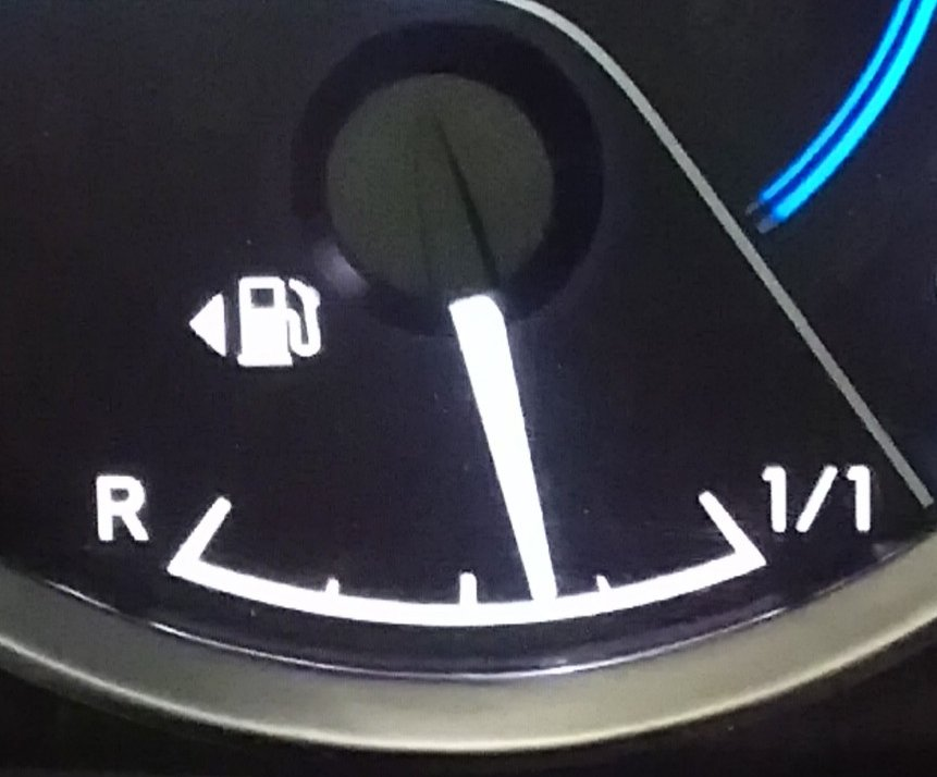 Jauge à essence Toyota Auris montrant l'indicateur de côté pour la trappe à essence à gauche